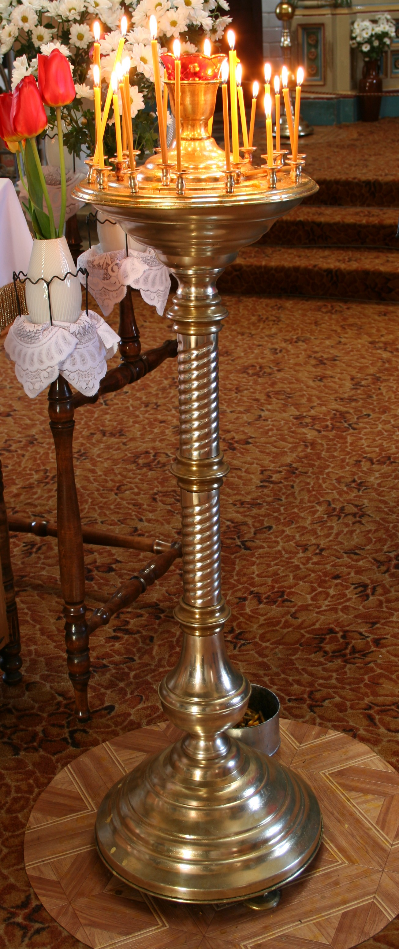 świecznik w cerkwi Mikołaja Cudotwórcy w Białowieży